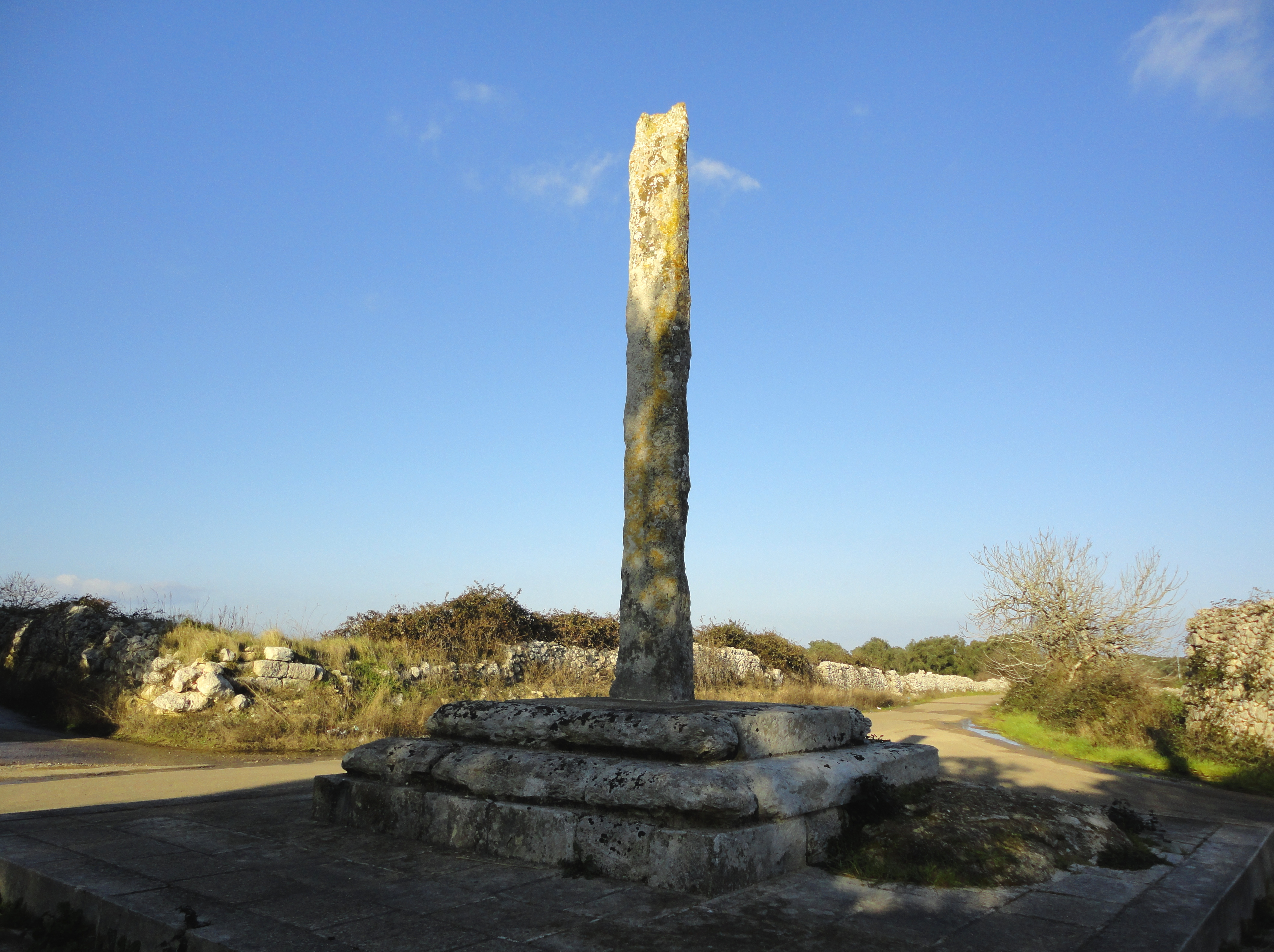 Menhir Croce di Sant'Antonio Sanarica, Lecce